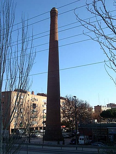 Chimenea y simbolo del barrio